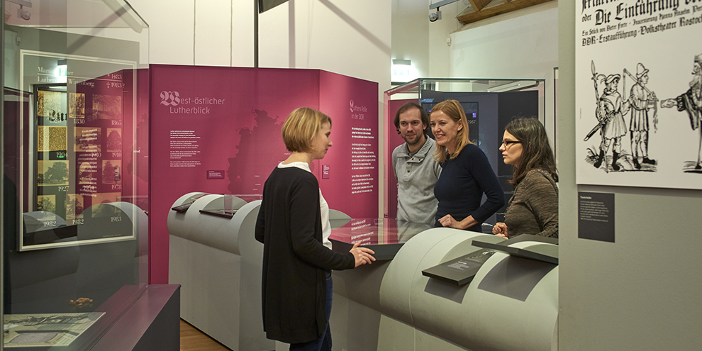 Besucher der Ausstellung "Luther. 1917 bis heute" im Kloster Dalheim